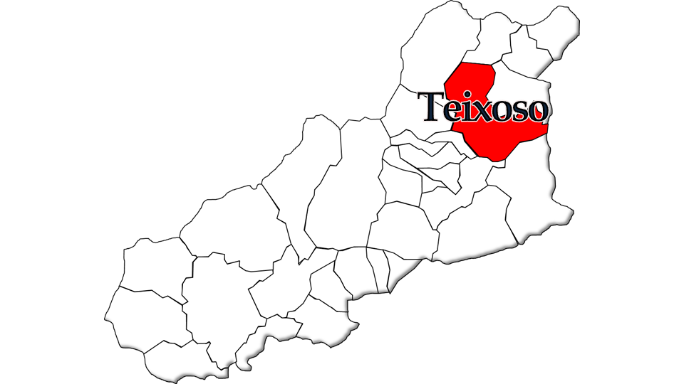 População